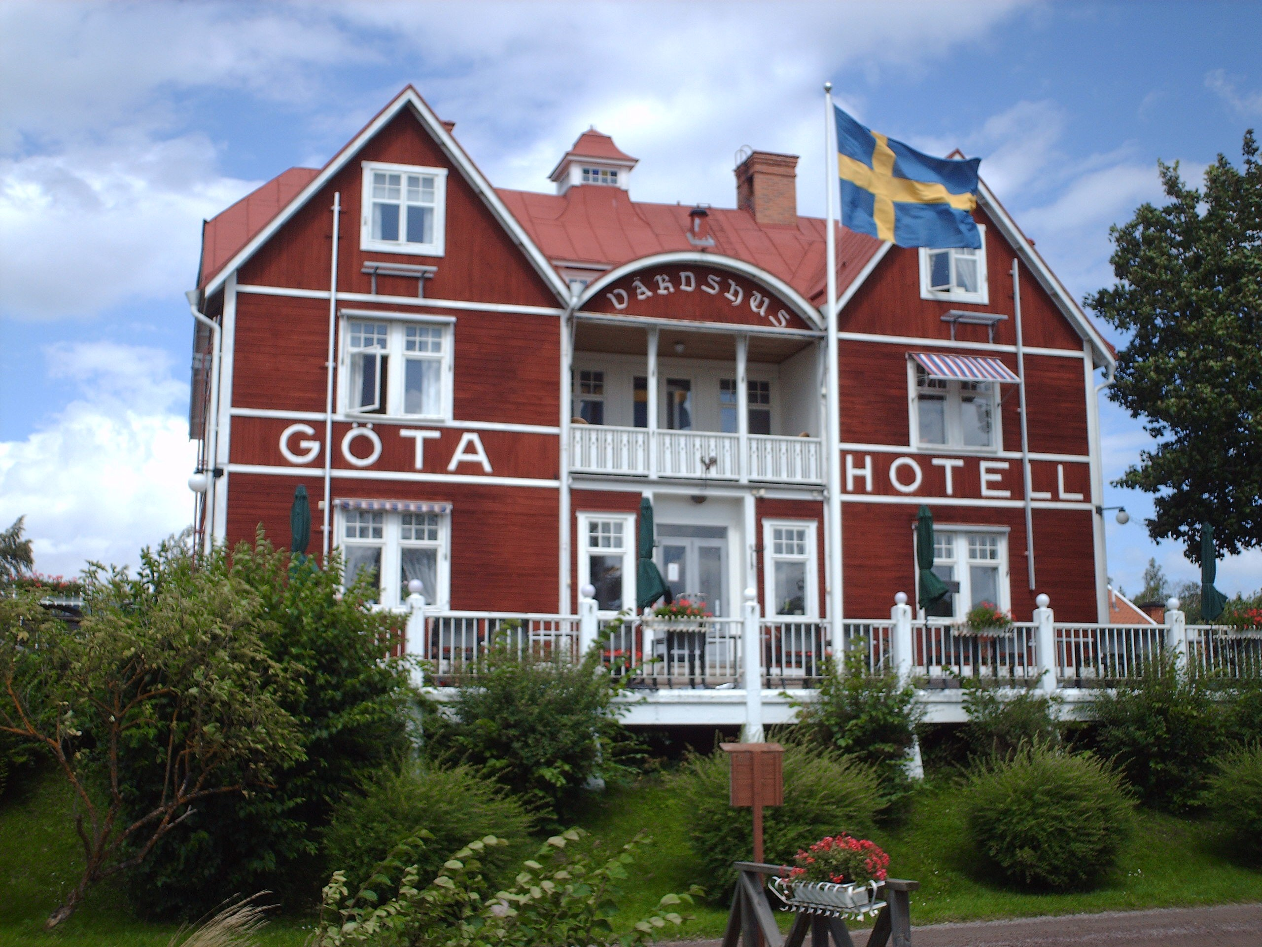 Göta Hotel, Borensberg, Sweden.